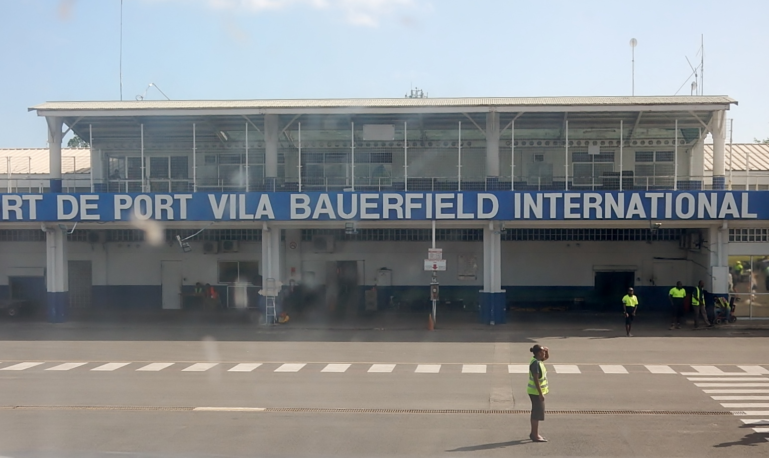 Port Vila Bauerfeld Airport